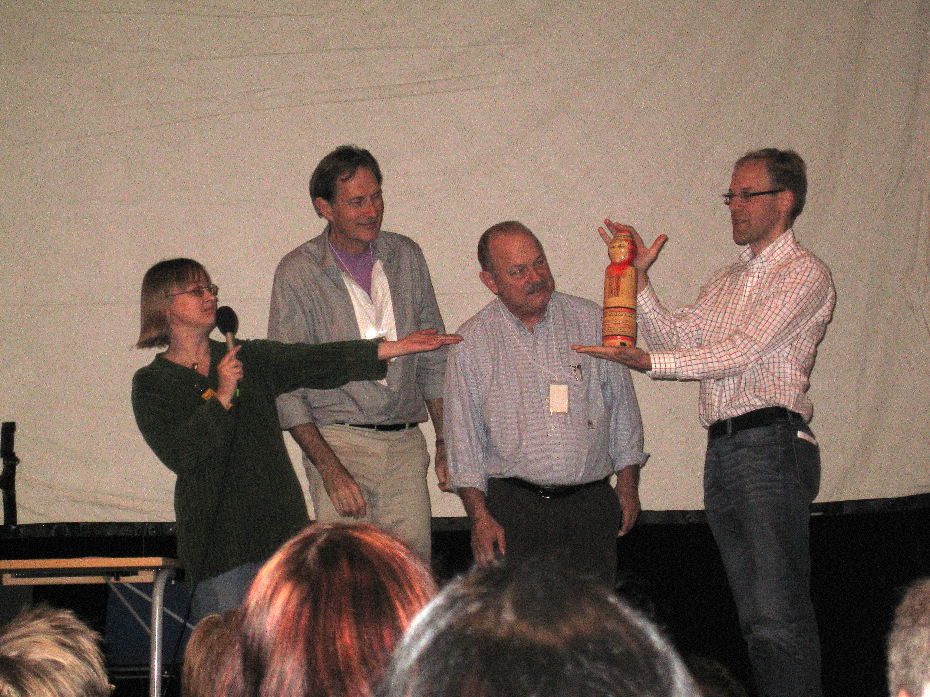 Ylva Spångberg, Geoff Ryman, Joe Haldeman and Martin Andreasson at Imagicon, Swecon, 2006 in Stockholm.